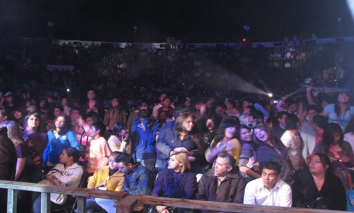 Feria de Uriangato Concierto de REIK